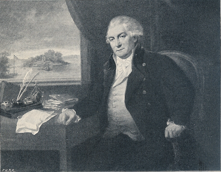 Frédéric de Coninck (1740-1811)